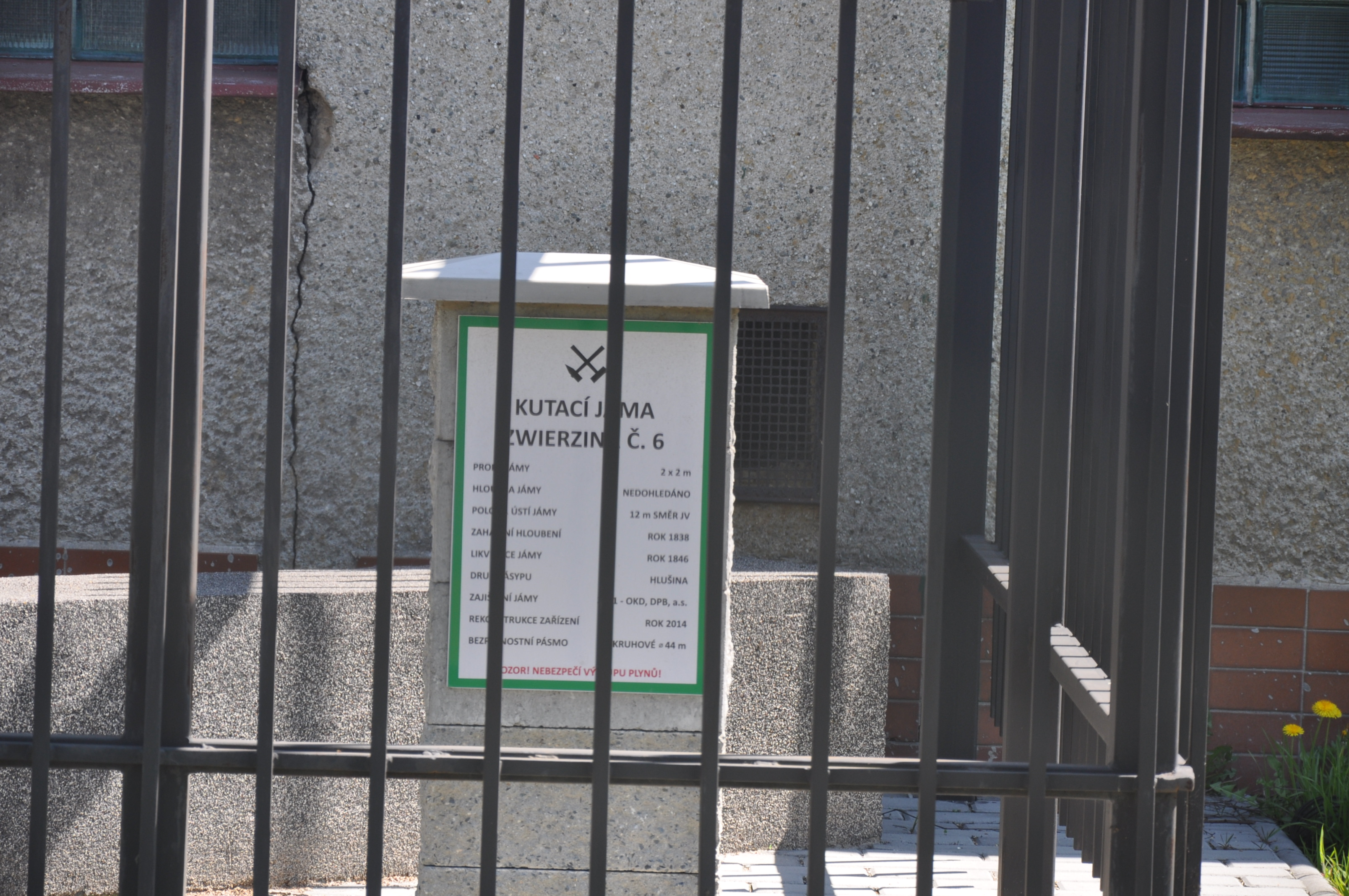 Kutací jáma Zwierzina číslo 6, Slezská Ostrava.